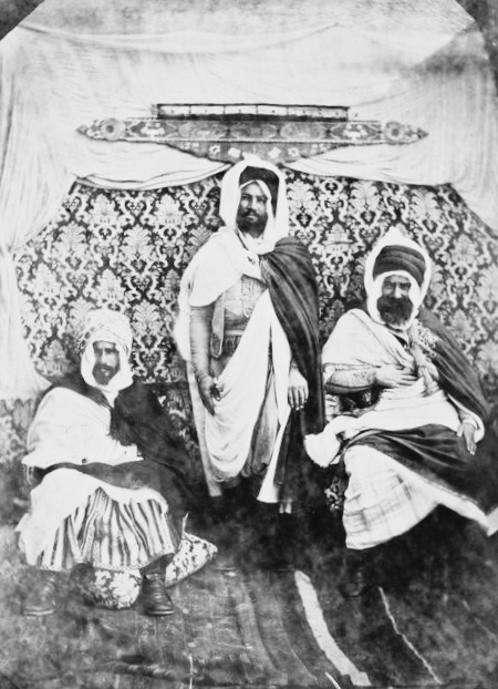 Notables musulmans, Guelma, 1856. Ahmet Schériff, Ahmet Zeïn Kaïd des Zerdezas, Taïb Ben Zerguin Kaïd du Nad'Hor, Cercle de Guelma.